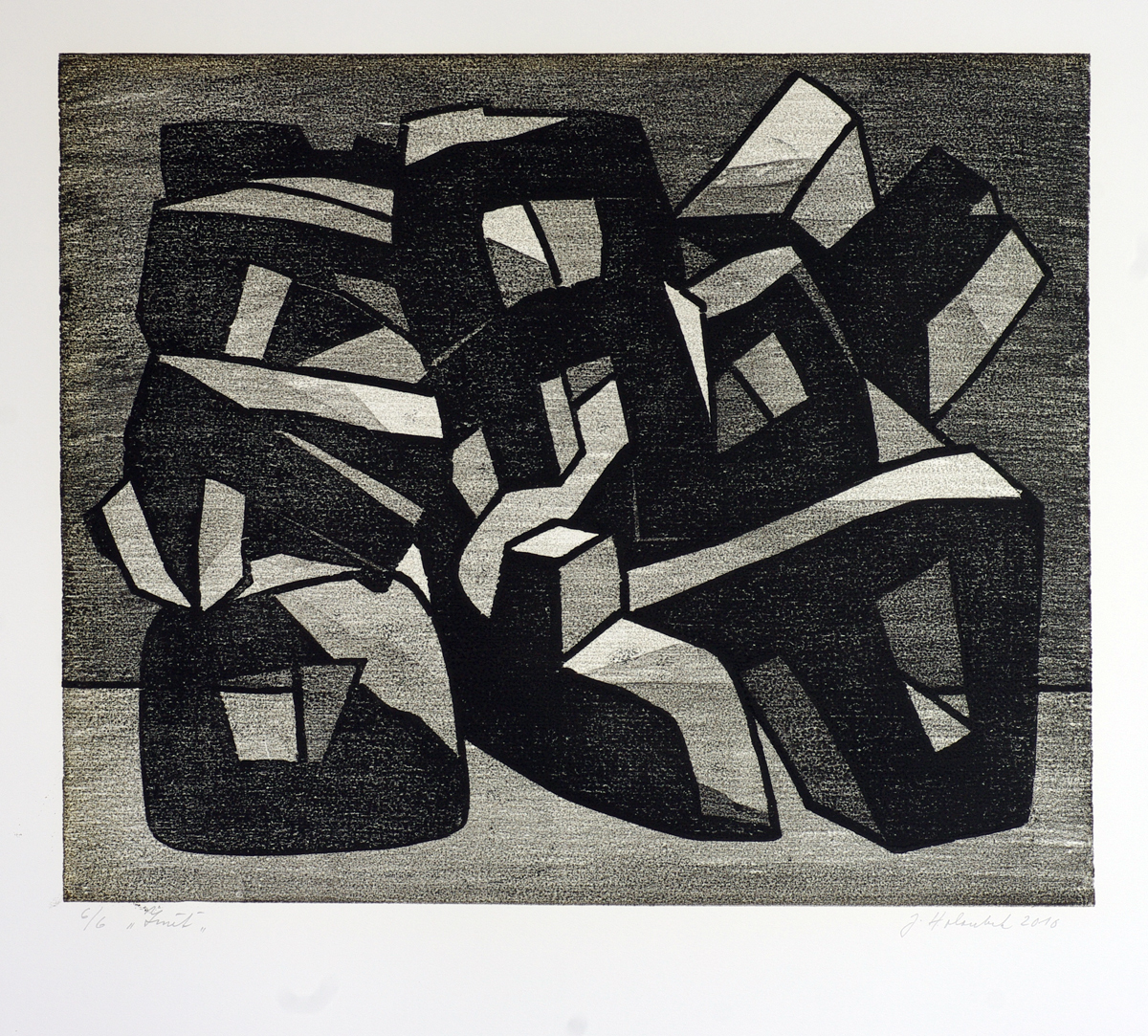 Jan Holoubek, Změť, dřevořez, 2010